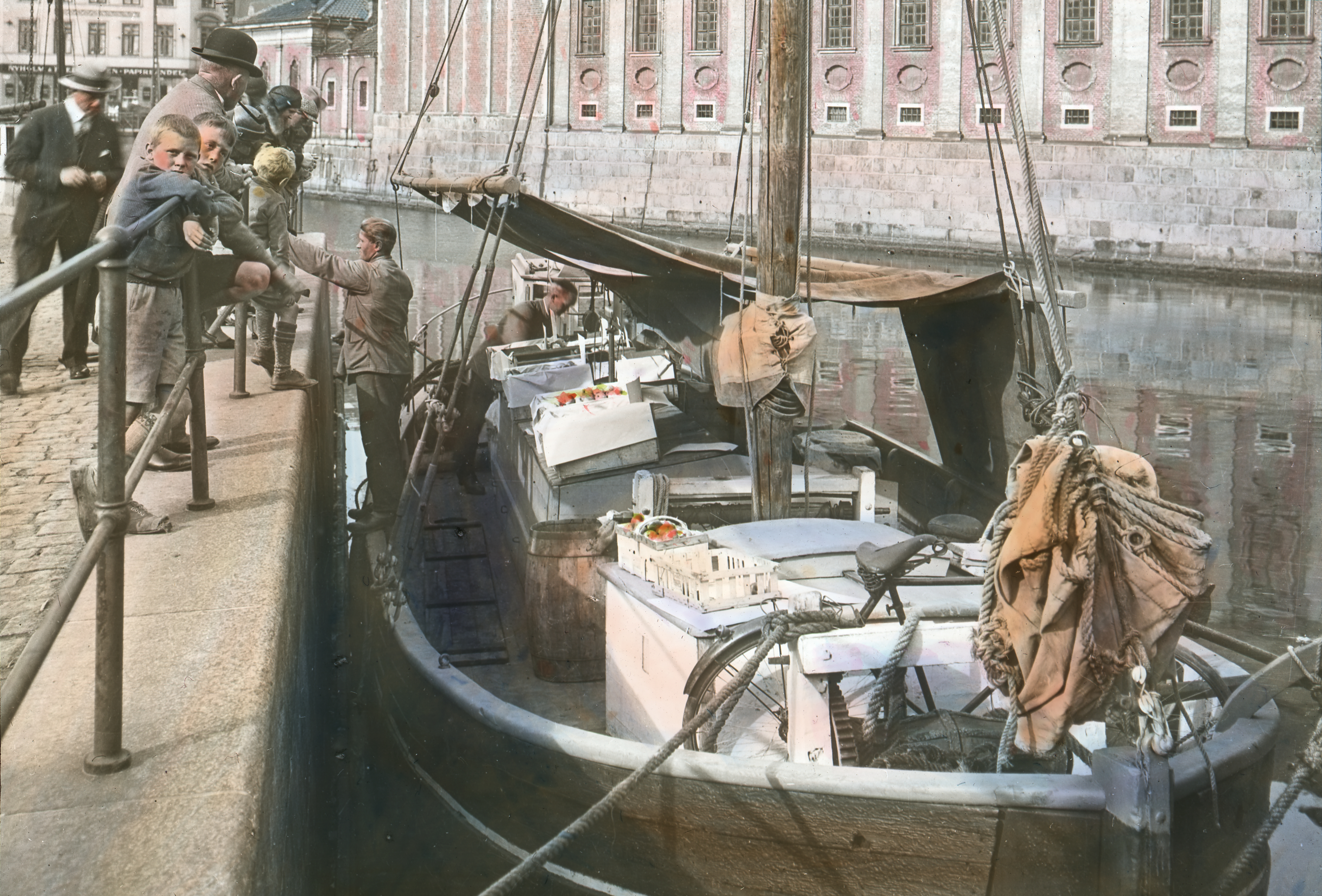 Pæreskude